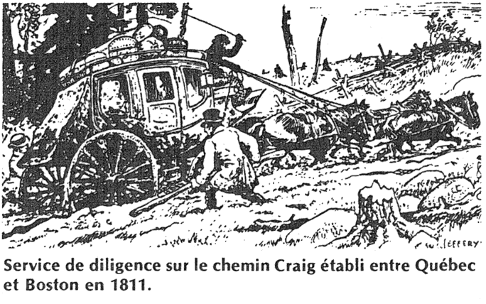 Le service de diligence sur le Chemin Craig établi entre Québec et Boston en 1811.